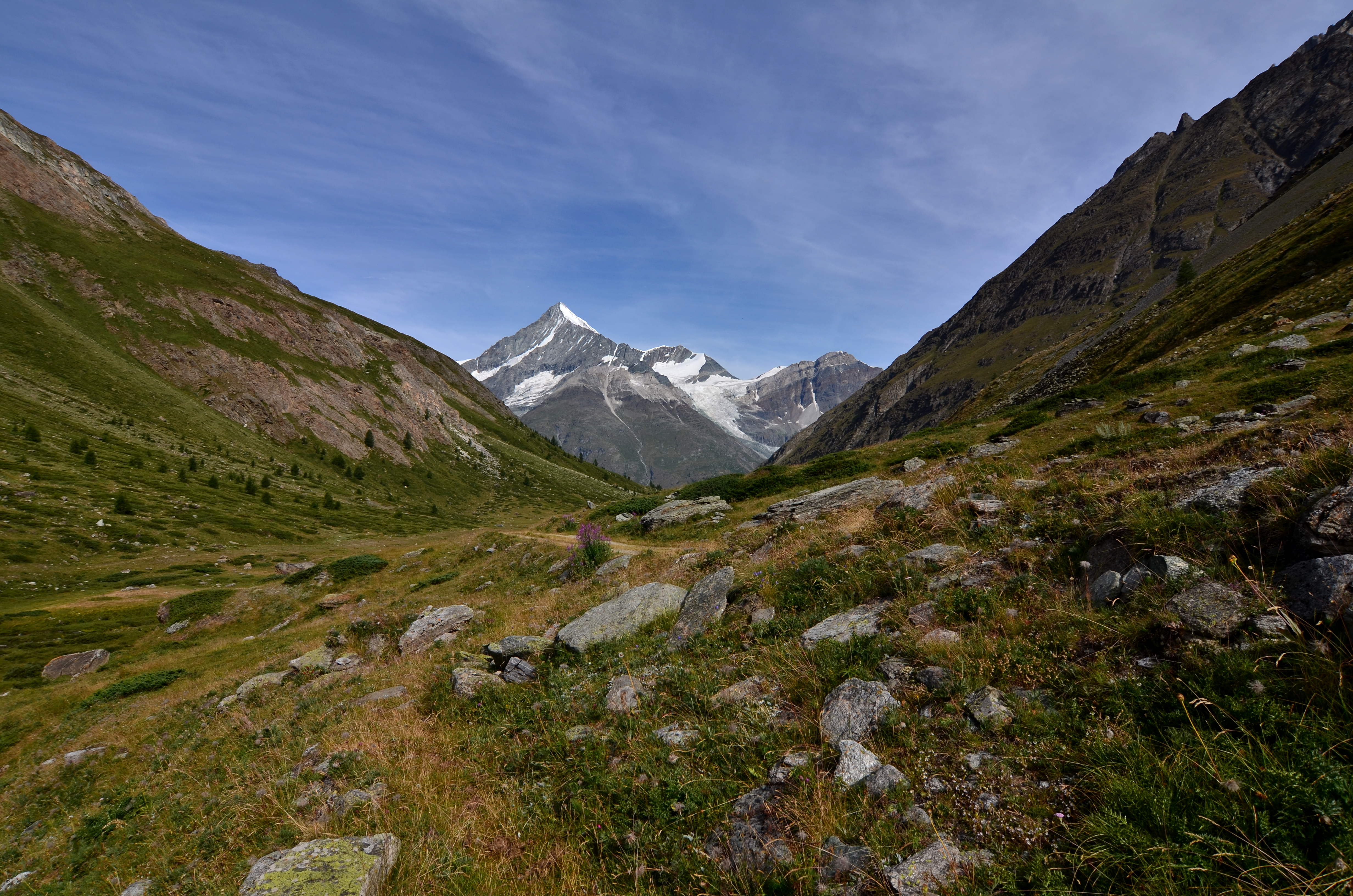 Weisshorn (4505m) depuis la vallée de Täsch